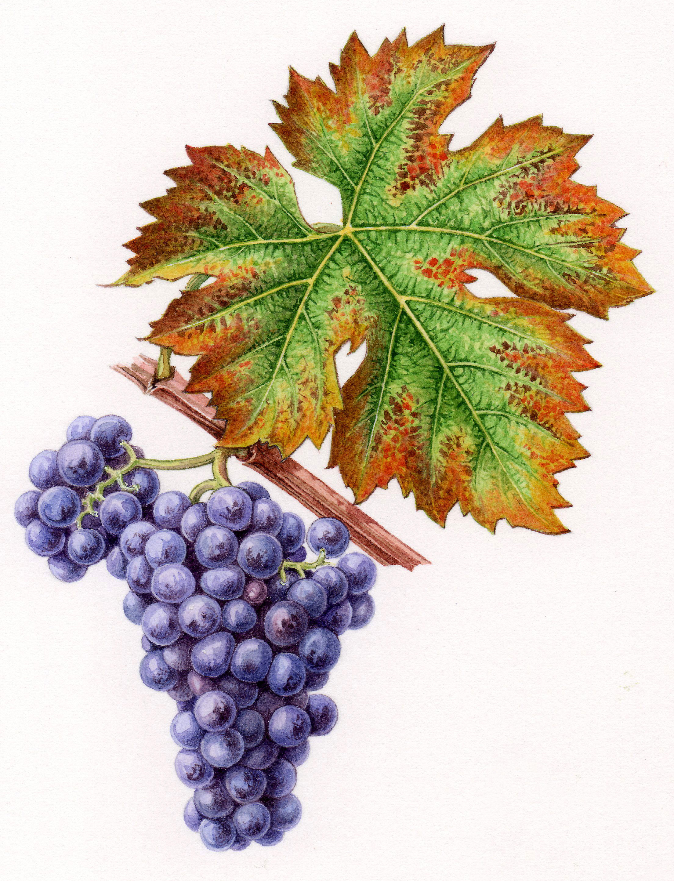 Aquarelles originales pour le Cépages de France (2001)